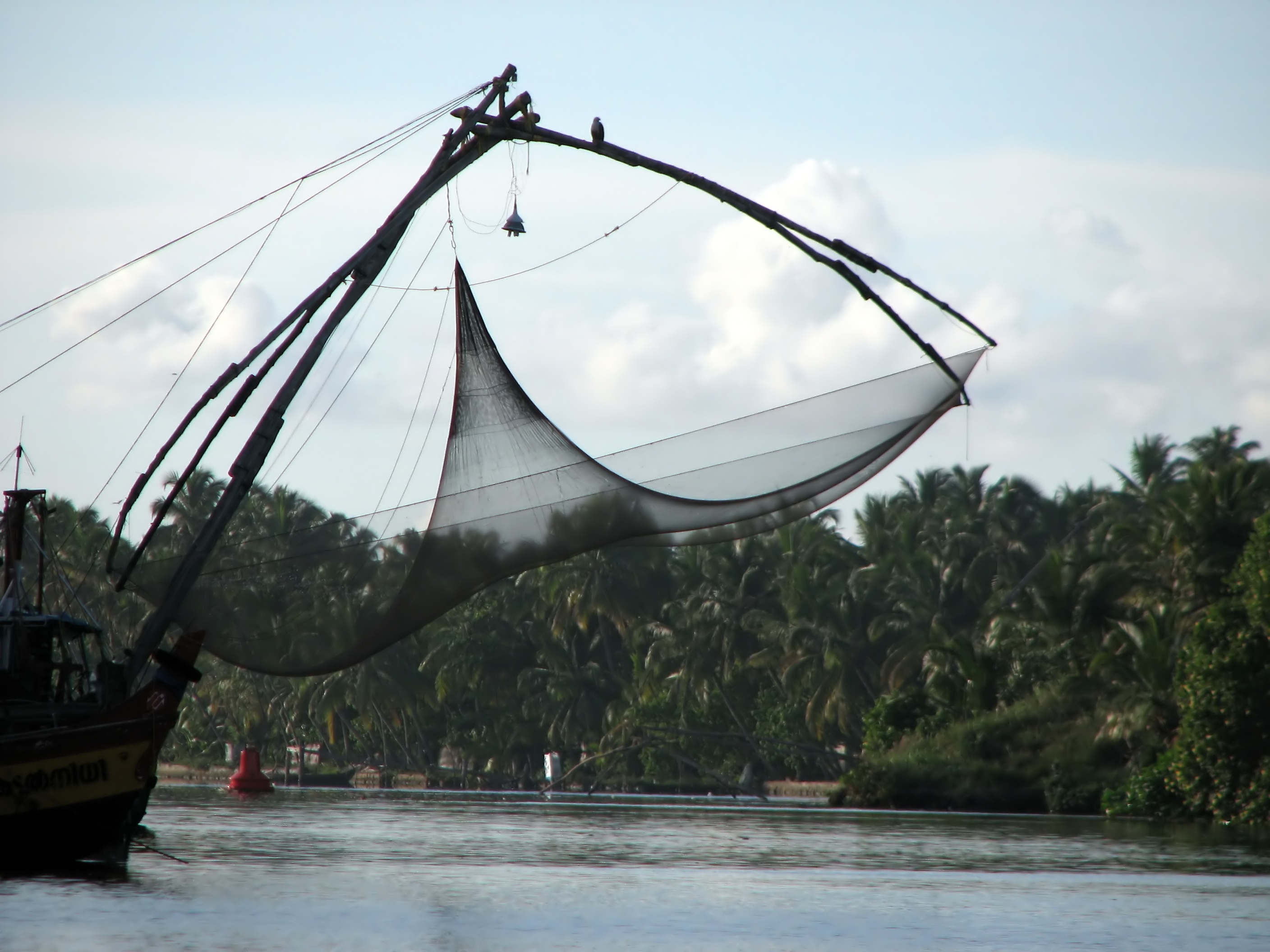 Kattilkadavu, Kollam